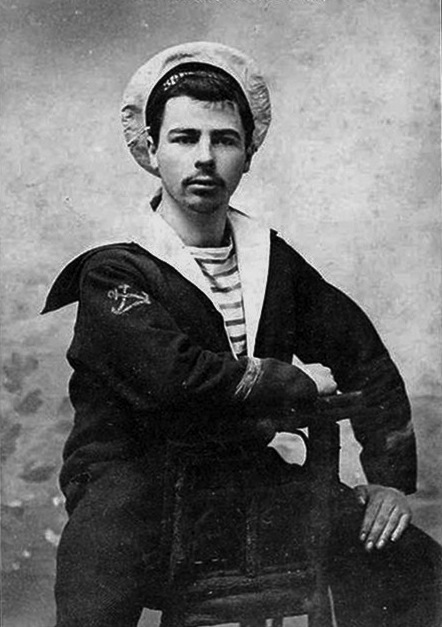 Marin français vers 1910.jpg